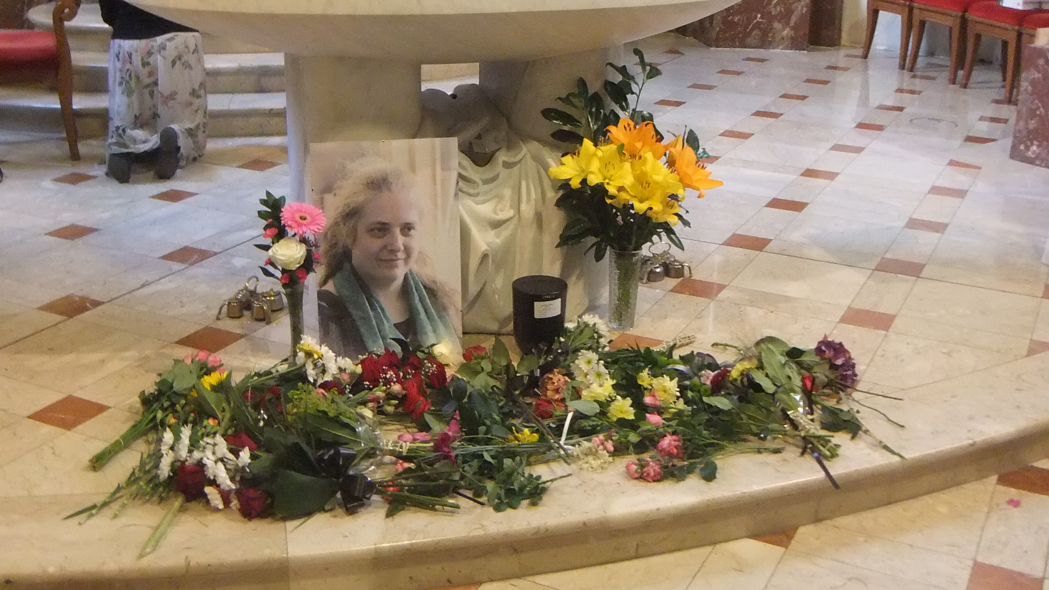 Rekviem za Markétu Procházkovou Lutkovou v kostele sv. Bartoloměje v Praze